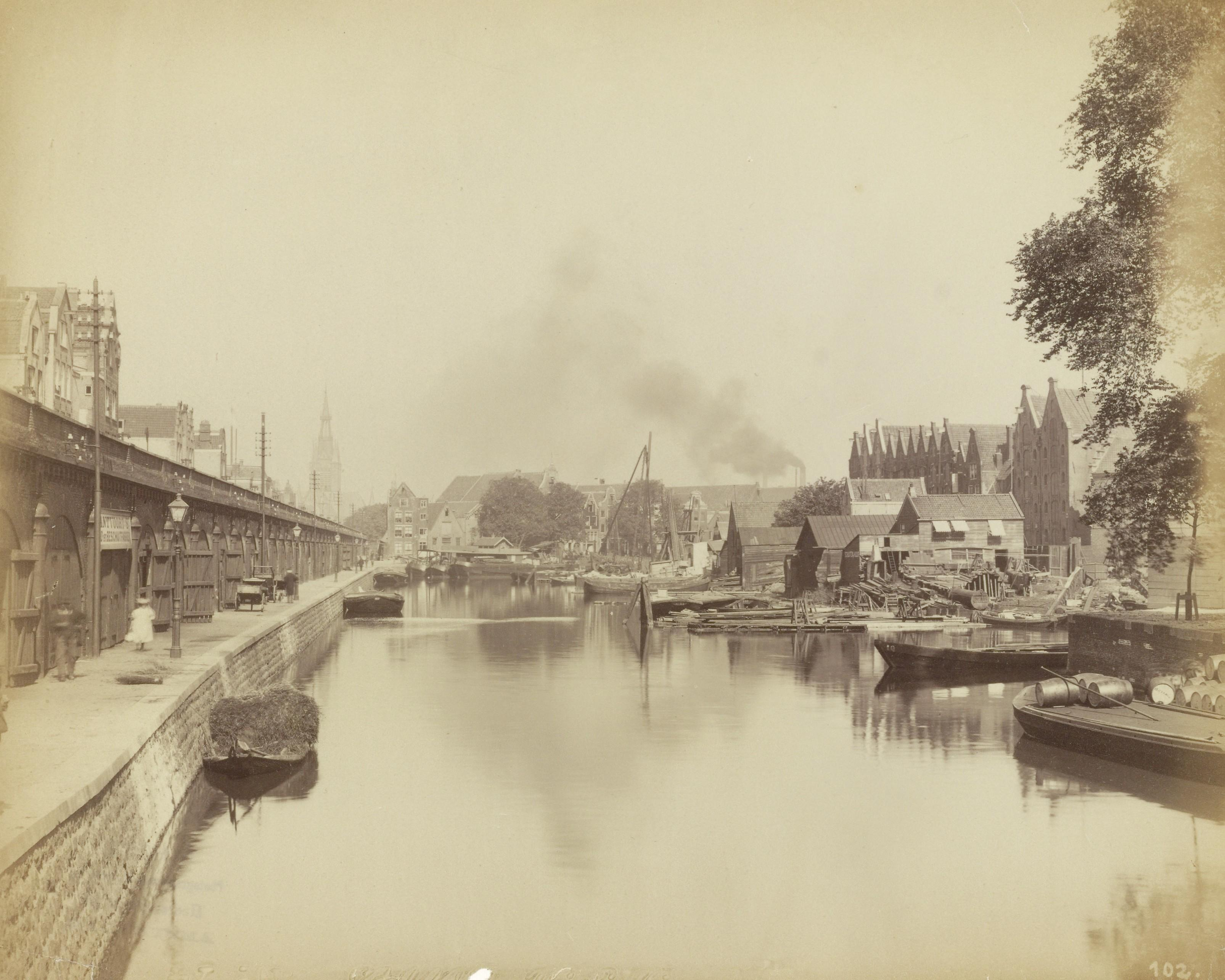 Beschrijving De Eilandsgracht gezien naar de Nieuwe Teertuinen Links het spoorwegviaduct langs de Haarlemmer Houttuinen en rechts het Prinseneiland. Documenttype foto Vervaardiger Onbekend Anoniem Atelier Herz Collectie Collectie Stadsarchief Amsterdam: foto-afdrukken Datering 1900 ca. Geografische naam Nieuwe Teertuinen Eilandsgracht Prinseneiland Inventarissen Afbeeldingsbestand ANWN00326000001